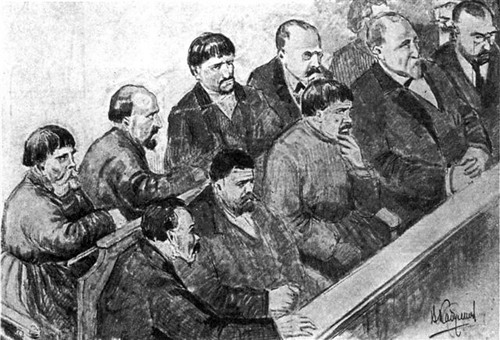 Присяжные заседатели на процессе Бейлиса Jury on the Beilis trial